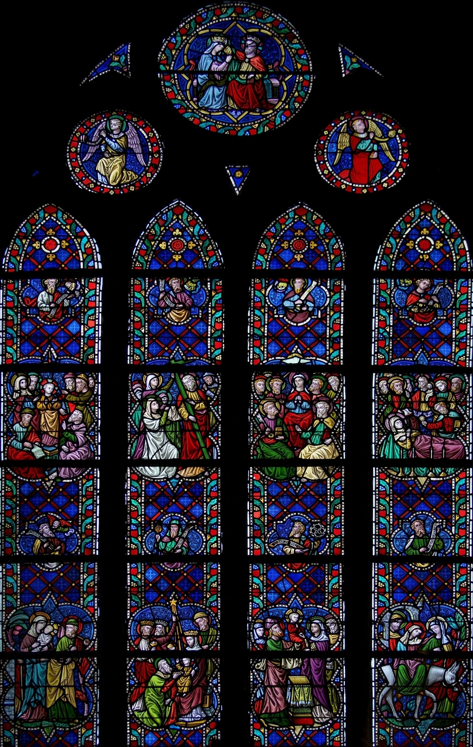 OLV Geboortekerk (Mariakerke) - Deel van het glasraam in het hoogkoor (J.-B. de Béthune).